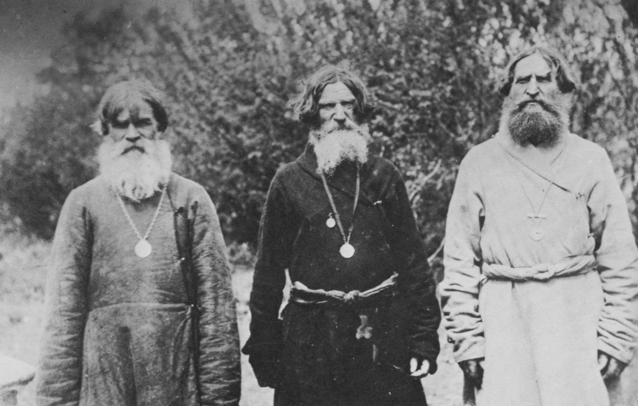 Russischer Photograph: Drei starosty (Dorfälteste), gewählte Vorsteher der Dorfgemeinschaft